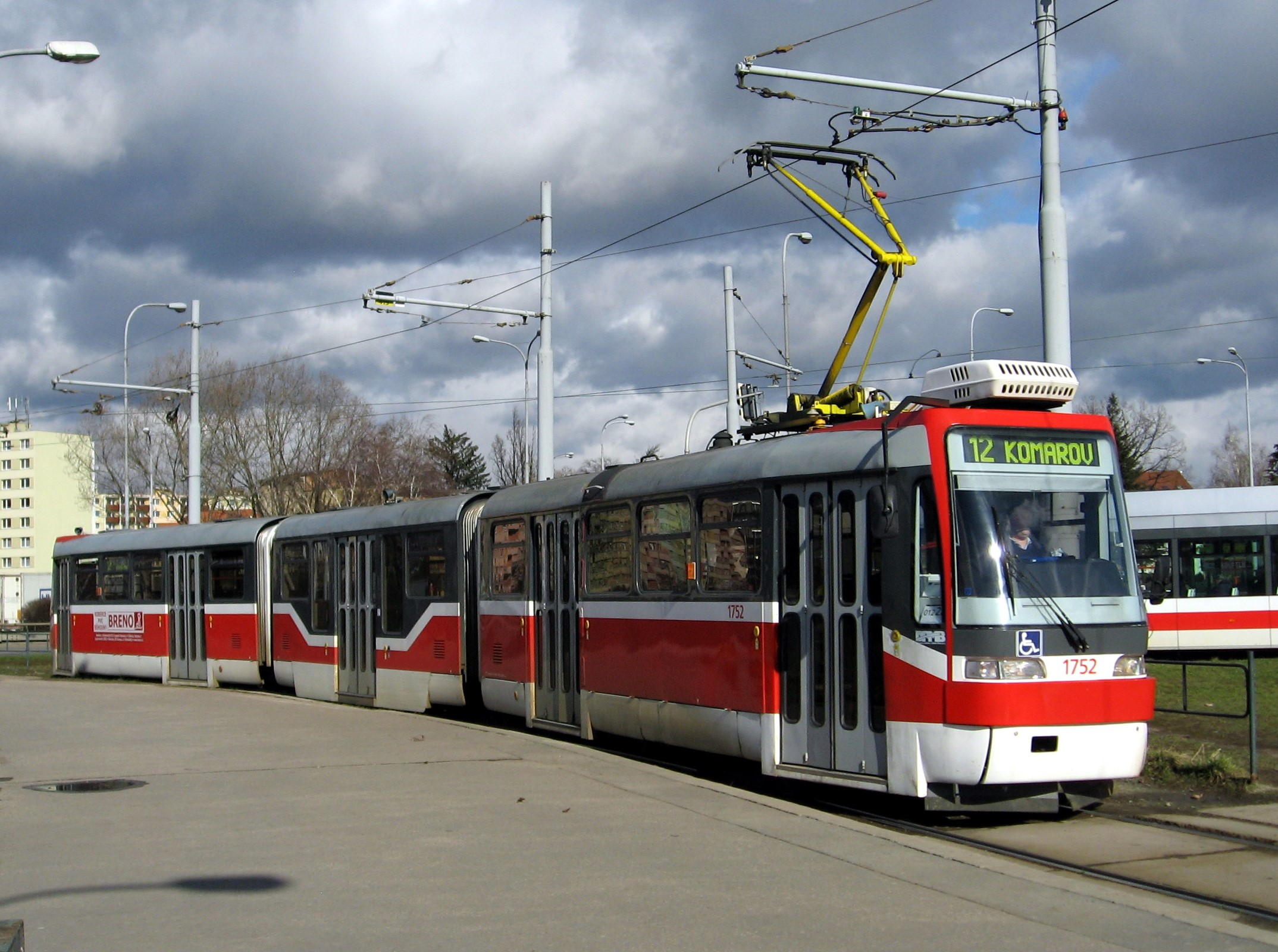 Tatra K3R-N v Brně